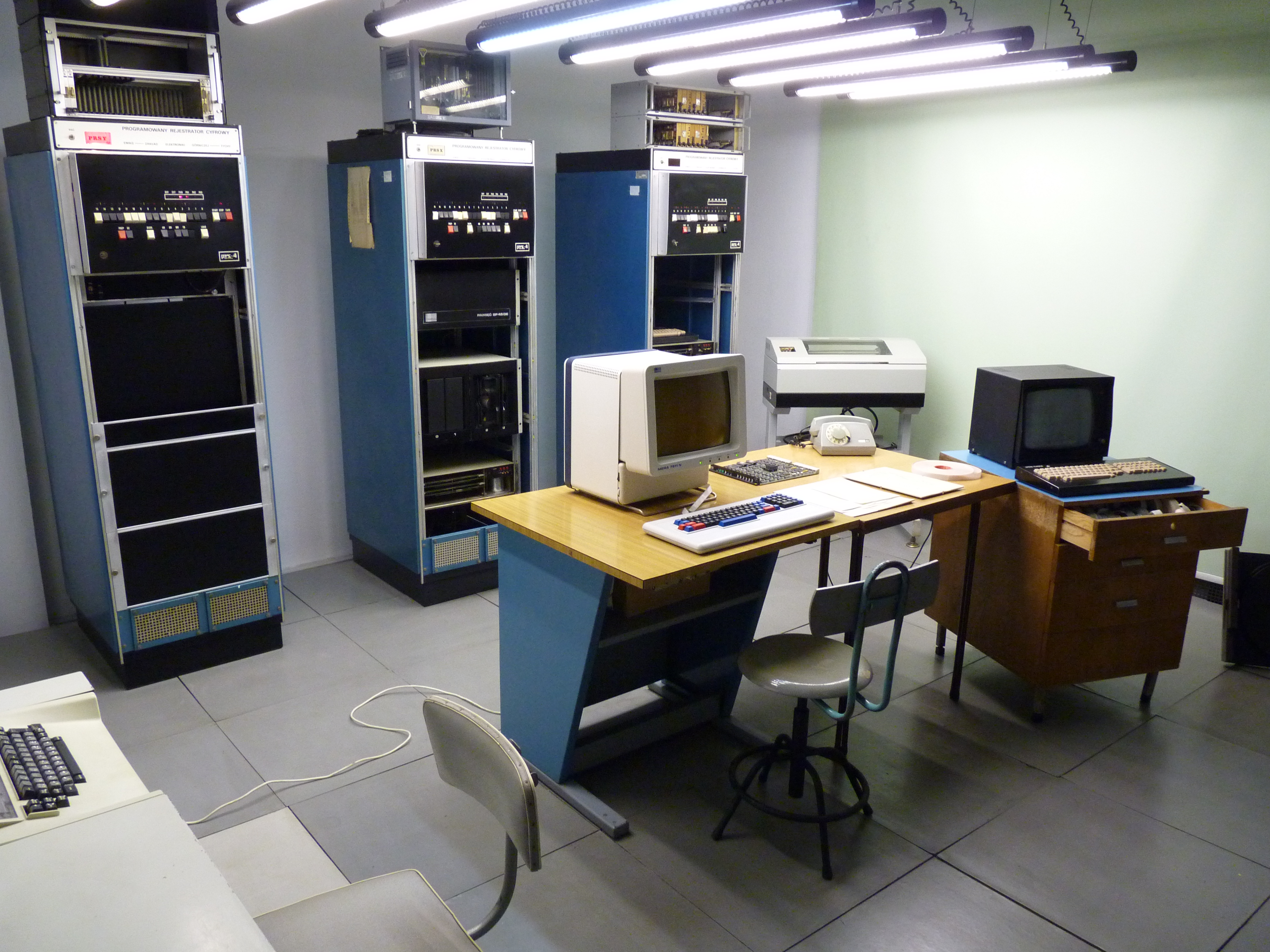 PRS 4 w Muzeum Historii komputerów i Informatyki w Katowicach uratowane z budynku DOKP Katowice